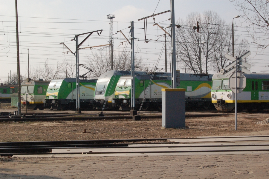 Tory odstawcze Kolei Mazowieckich na terenie stacji postojowej Warszawa Grochów.